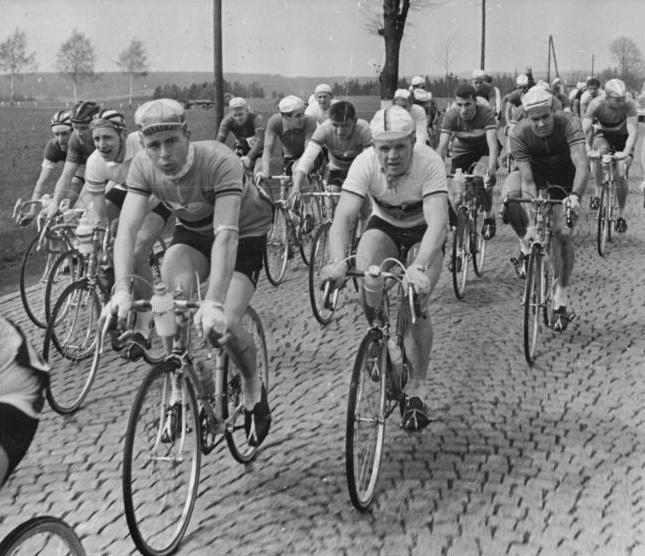 Friedensfahrt, Fahrerfeld Zentralbild Wendorf AV.3204 4.5.1960 - XIII. Friedensfahrt 1960 - 1. Etappe. UBz: Hagen (DDR) im Hauptfeld.